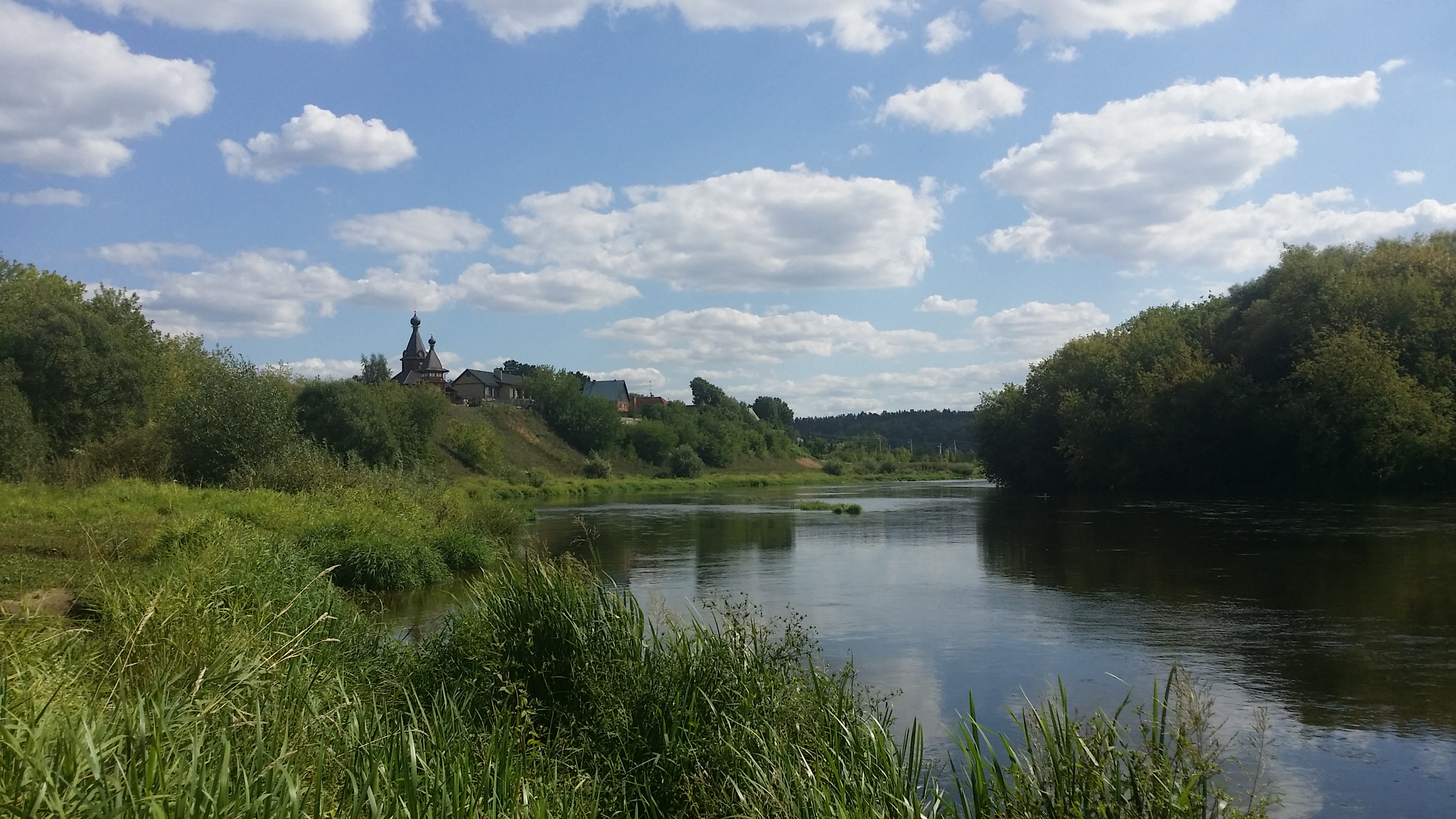 Одинцовский район. Москва-река и Троицкая церковь села Козина.